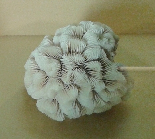 Coral Pedra de Iemanjá (Meandrina braziliensis). Acervo do Museu Nacional/UFRJ - Rio de Janeiro, Brasil.